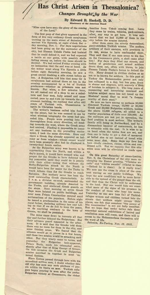 Статия от Едуард Хаскел, американски мисионер в Солун относно влизането на гръцките войски в Солун на 9 ноември 1912 г.